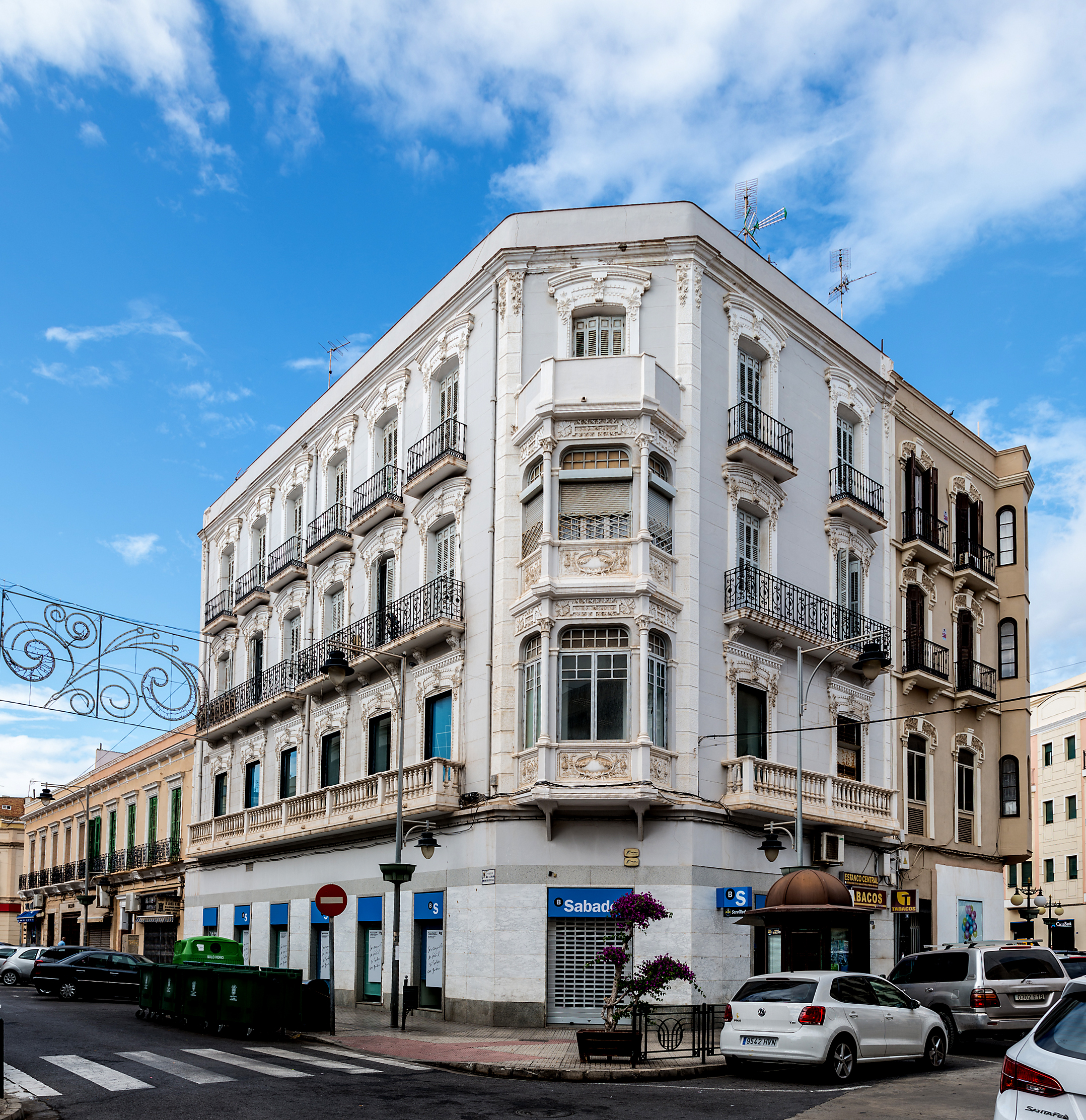 Edificio Banco Bilbao, Enrique Nieto,años veinte.